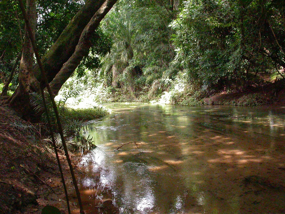 Forêt Classée du Kou, near Bobo-Dioulasso in Burkina Faso